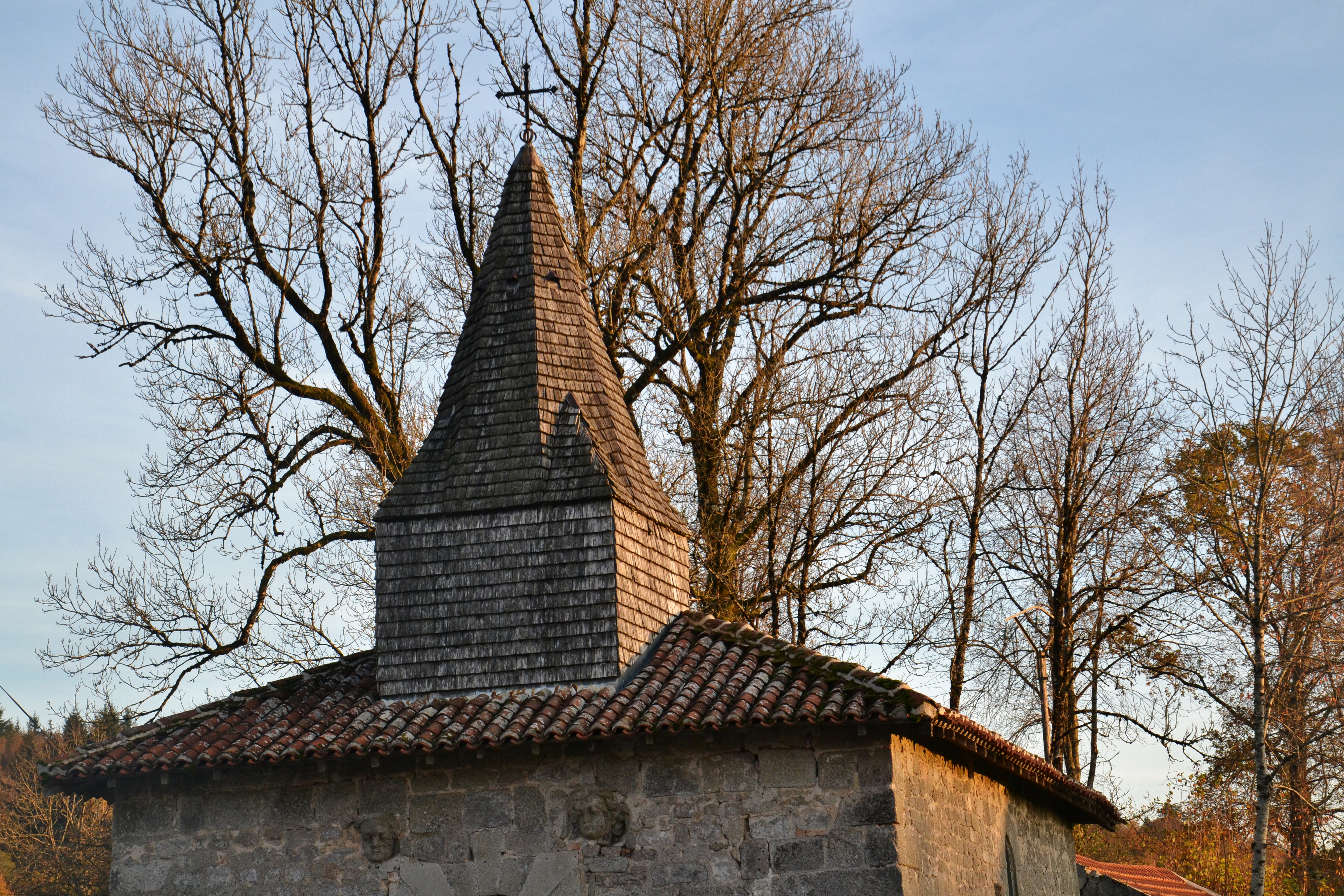 La chapelle de Grandmont (Saint-Sylvestre, Haute-Vienne, France)